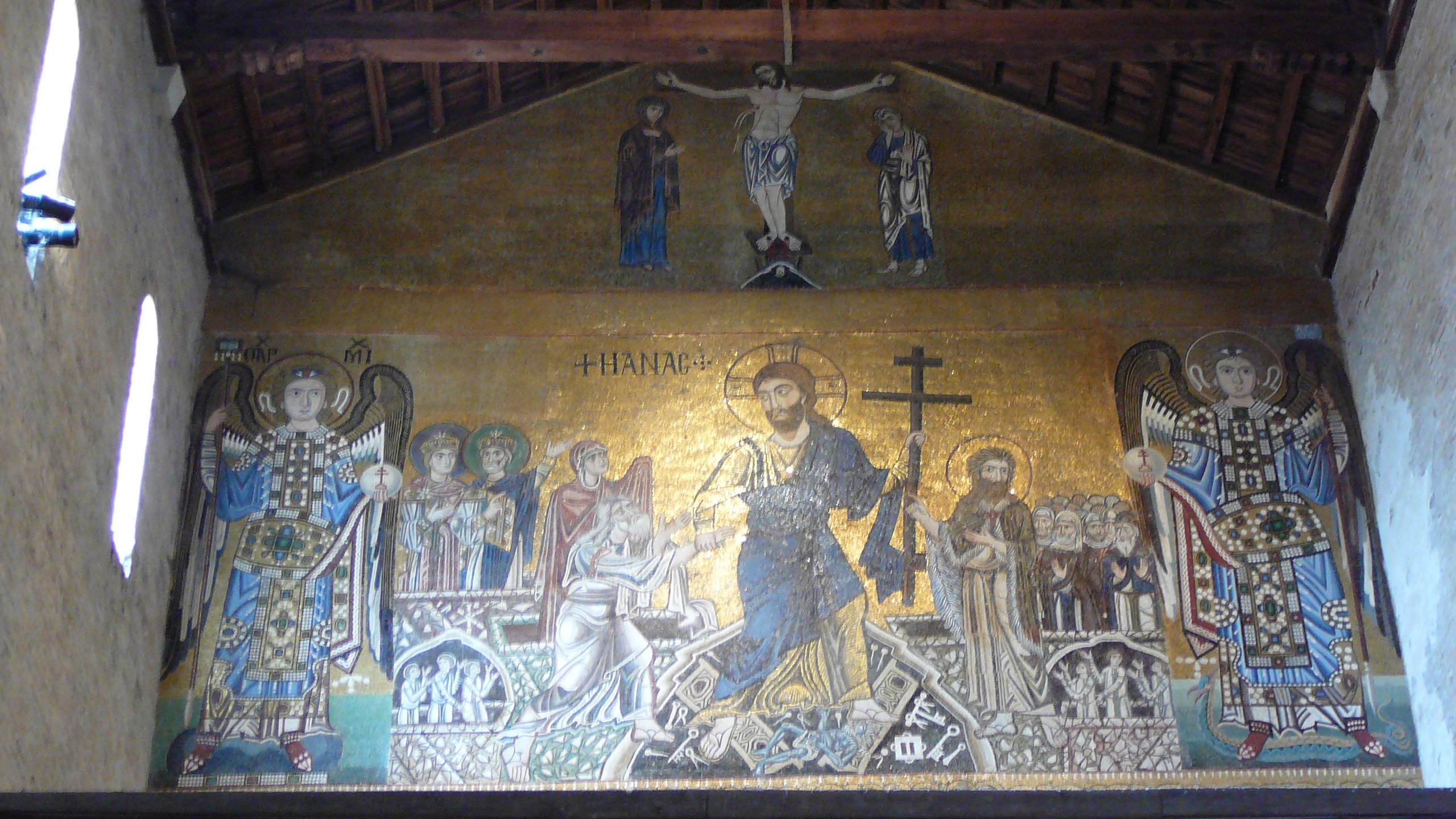 Torcello - Registres 1 & 2